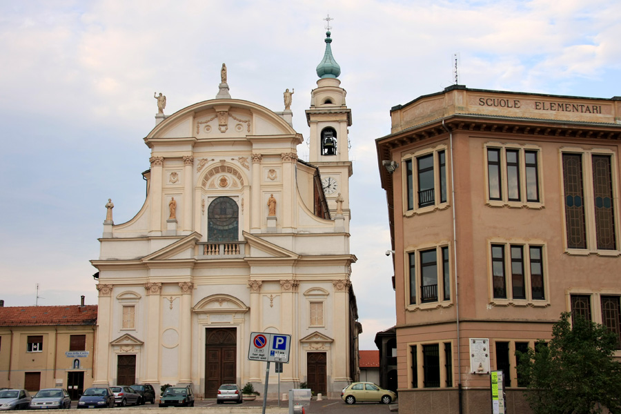 Veduta del centro di Cilavegna con la chiesa parrocchiale